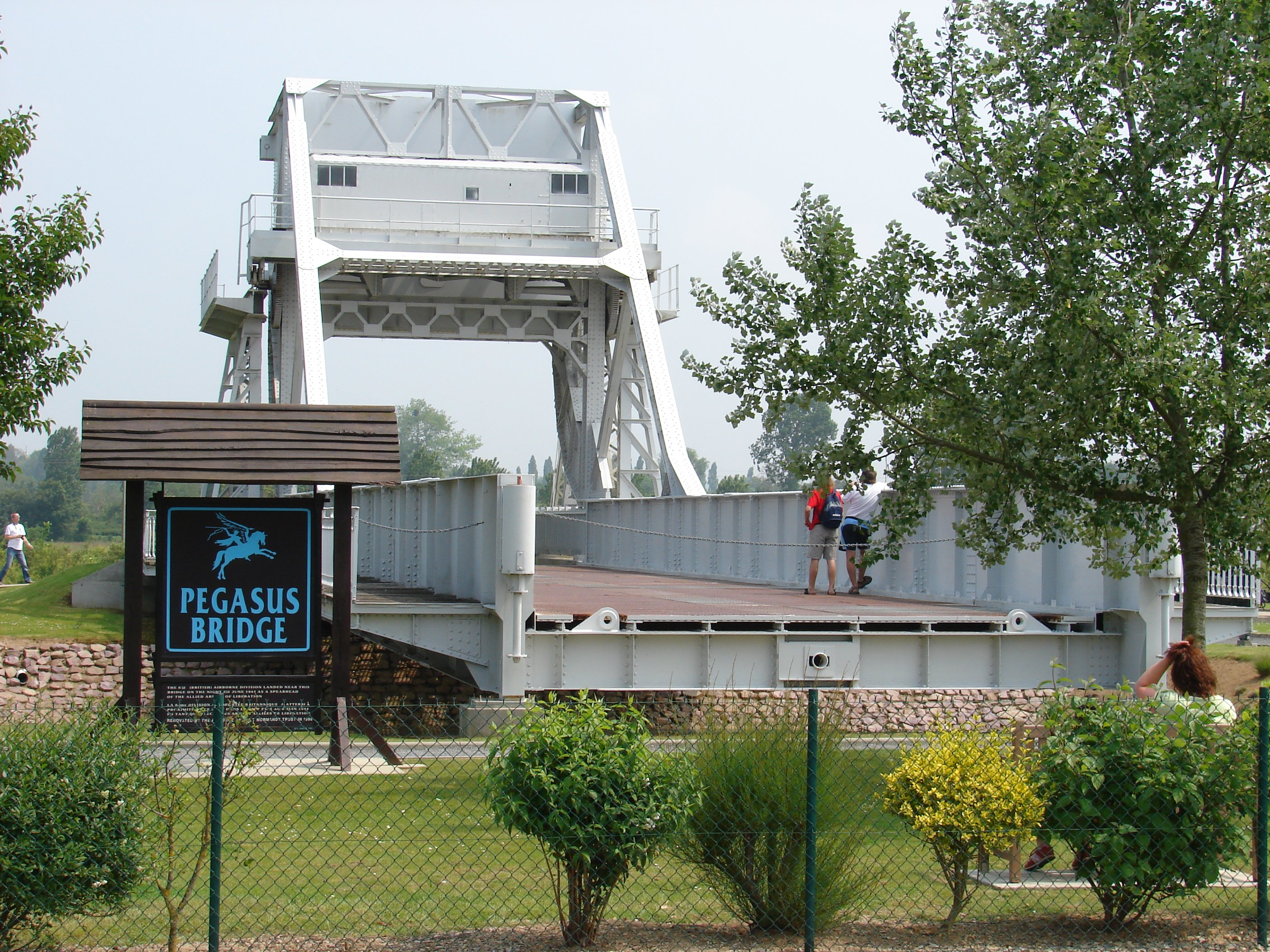 Ponte Pegasus original / original Pegasus Bridge